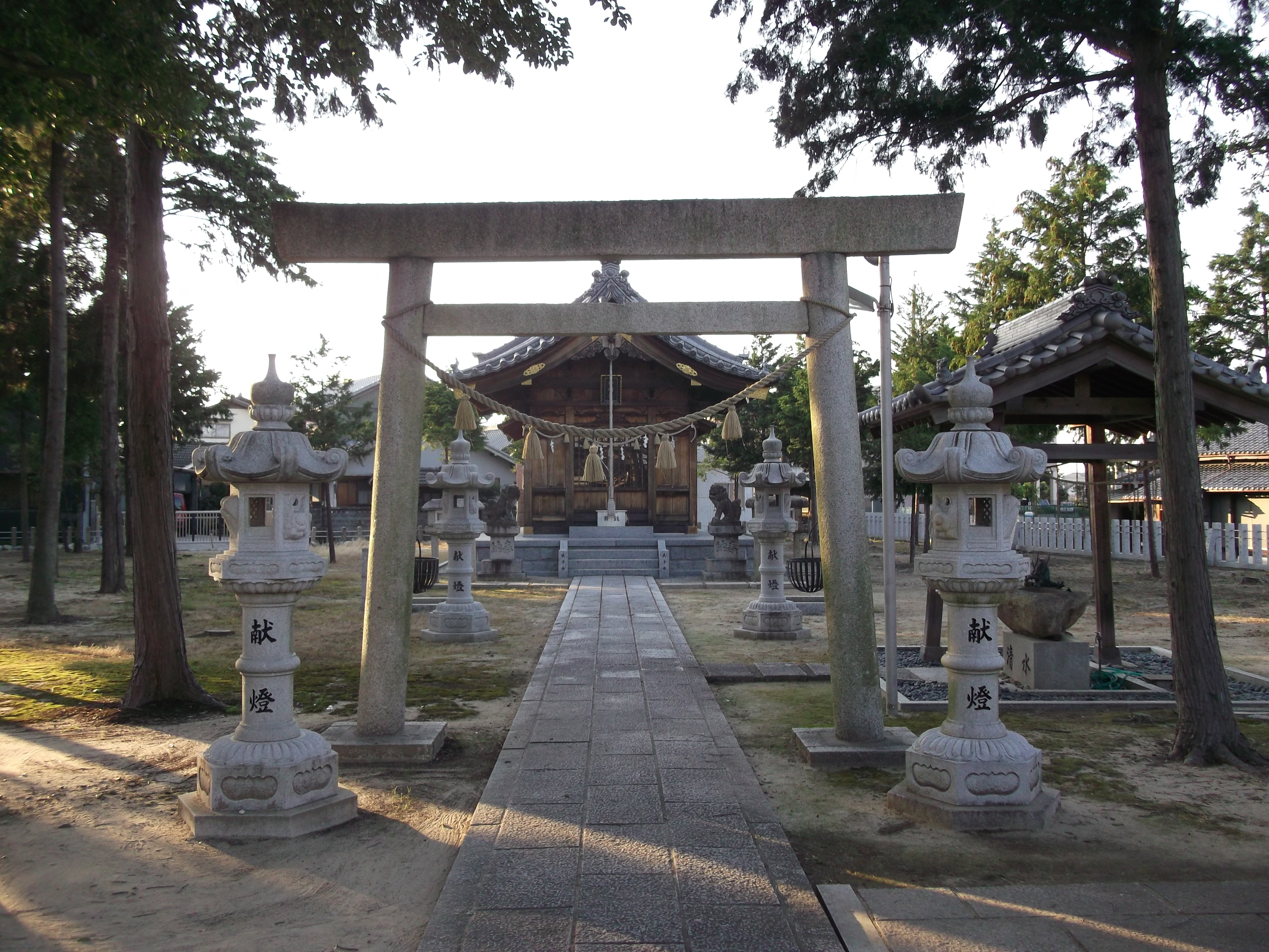 愛西市渕高町に鎮座する神明社